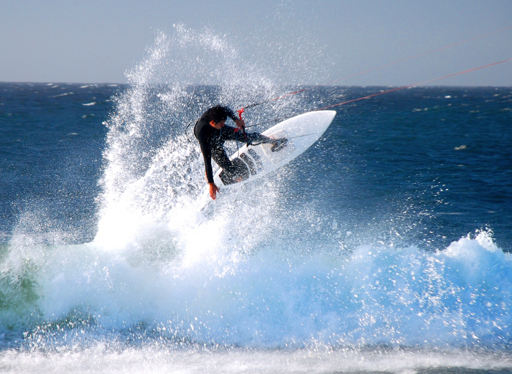 Un hombre practicando kitesurfing en las palyas de Curanipe, Chile.